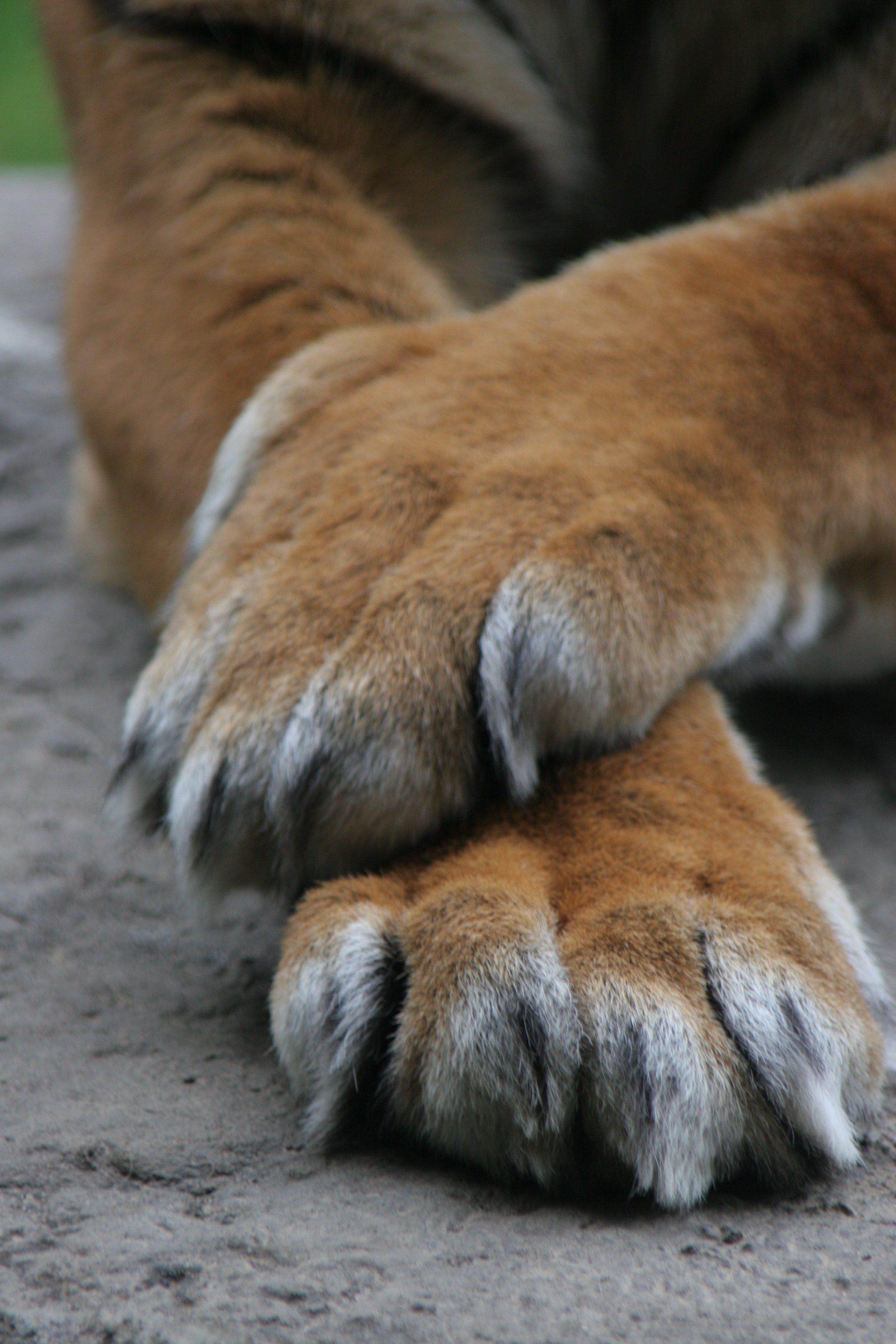 Tigerfeet